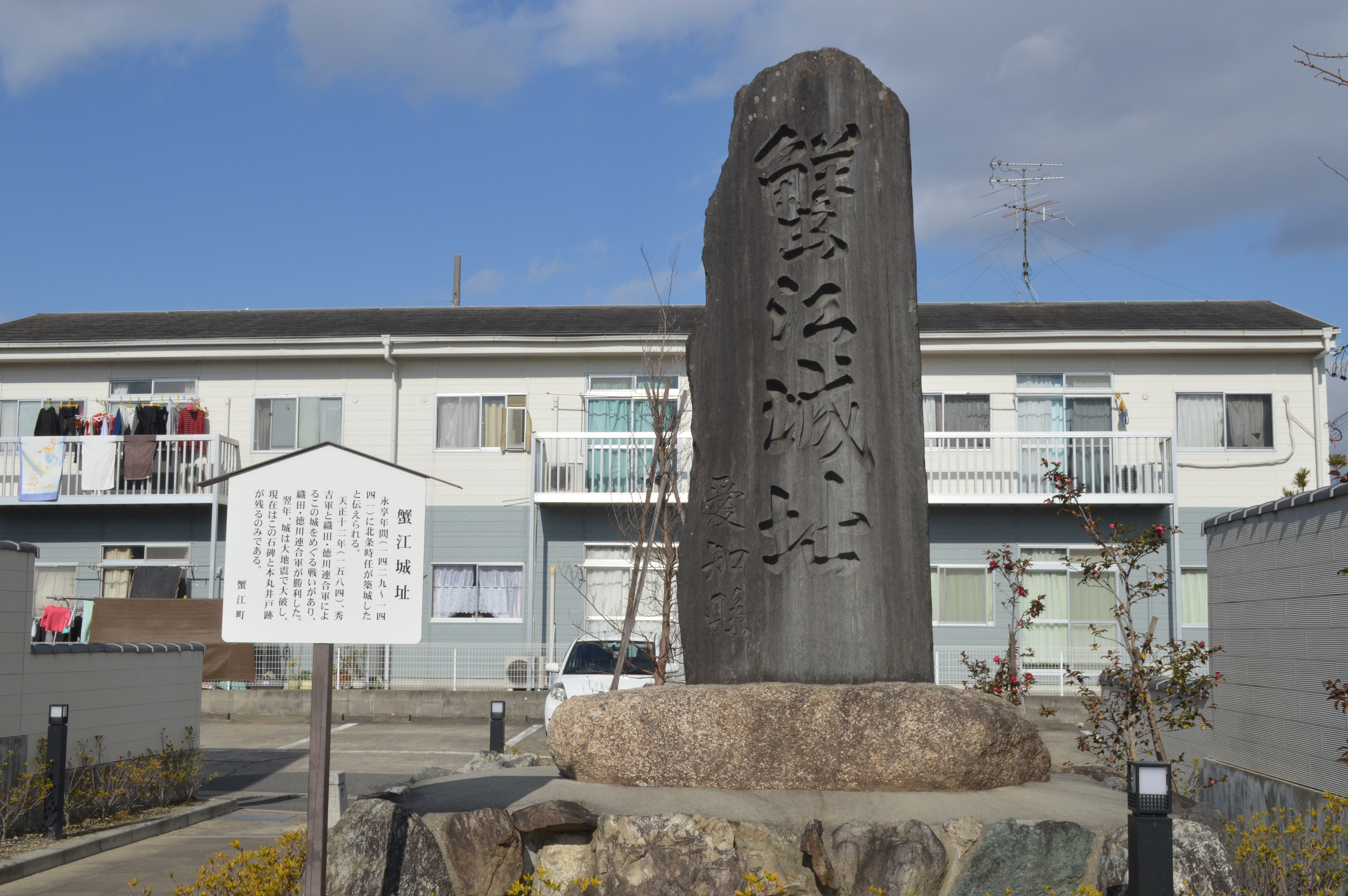 愛知県海部郡蟹江町にある蟹江城址。